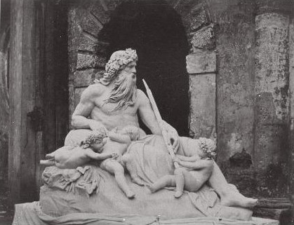 Tartu, skultuurigrupp Vater Rhein